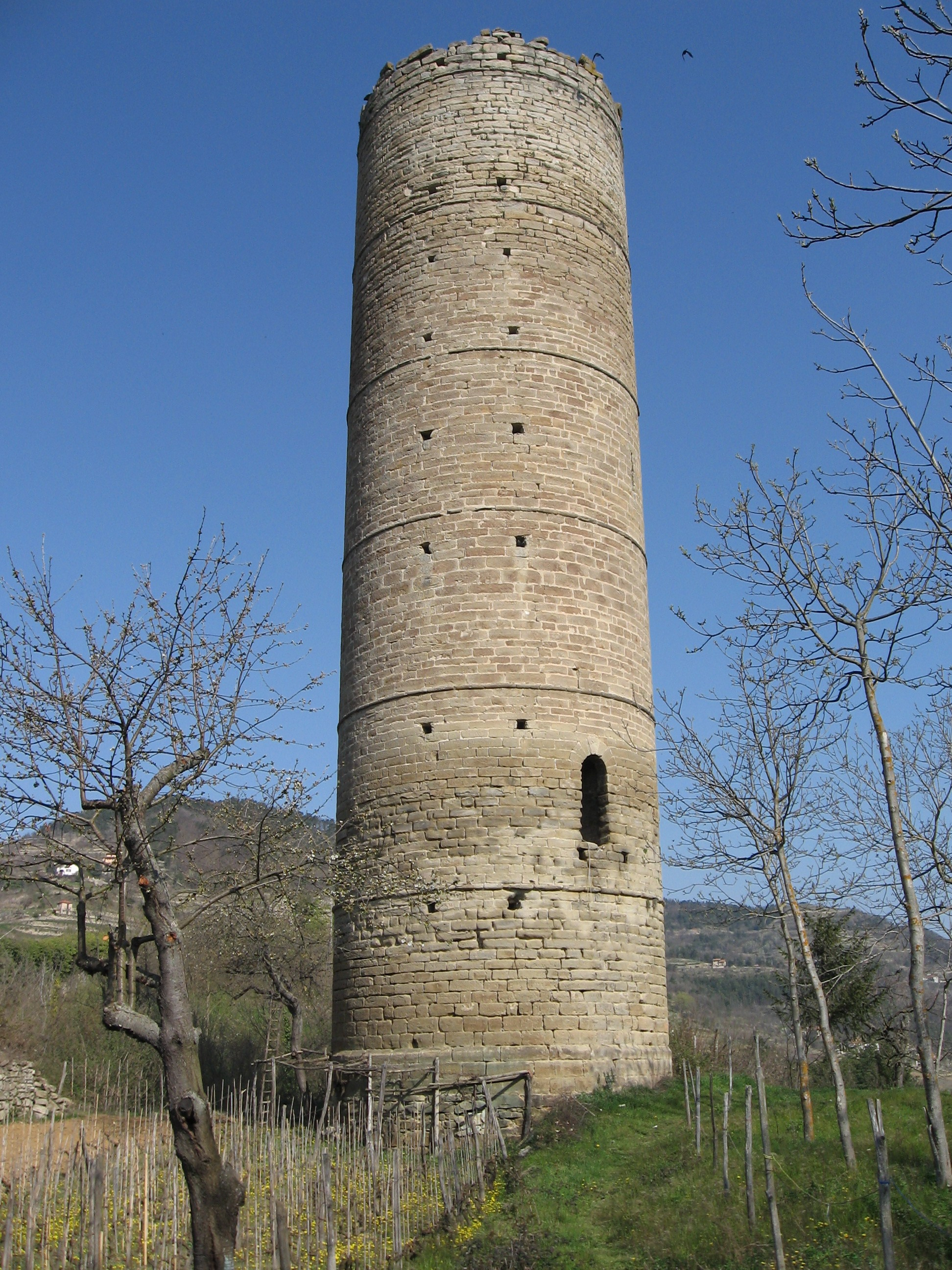 La Torre di Cortemilia vista dall'accesso sud-est. Area del castello medioevale di Cortemilia (Cuneo). Giovanni Destefanis, opera propria.